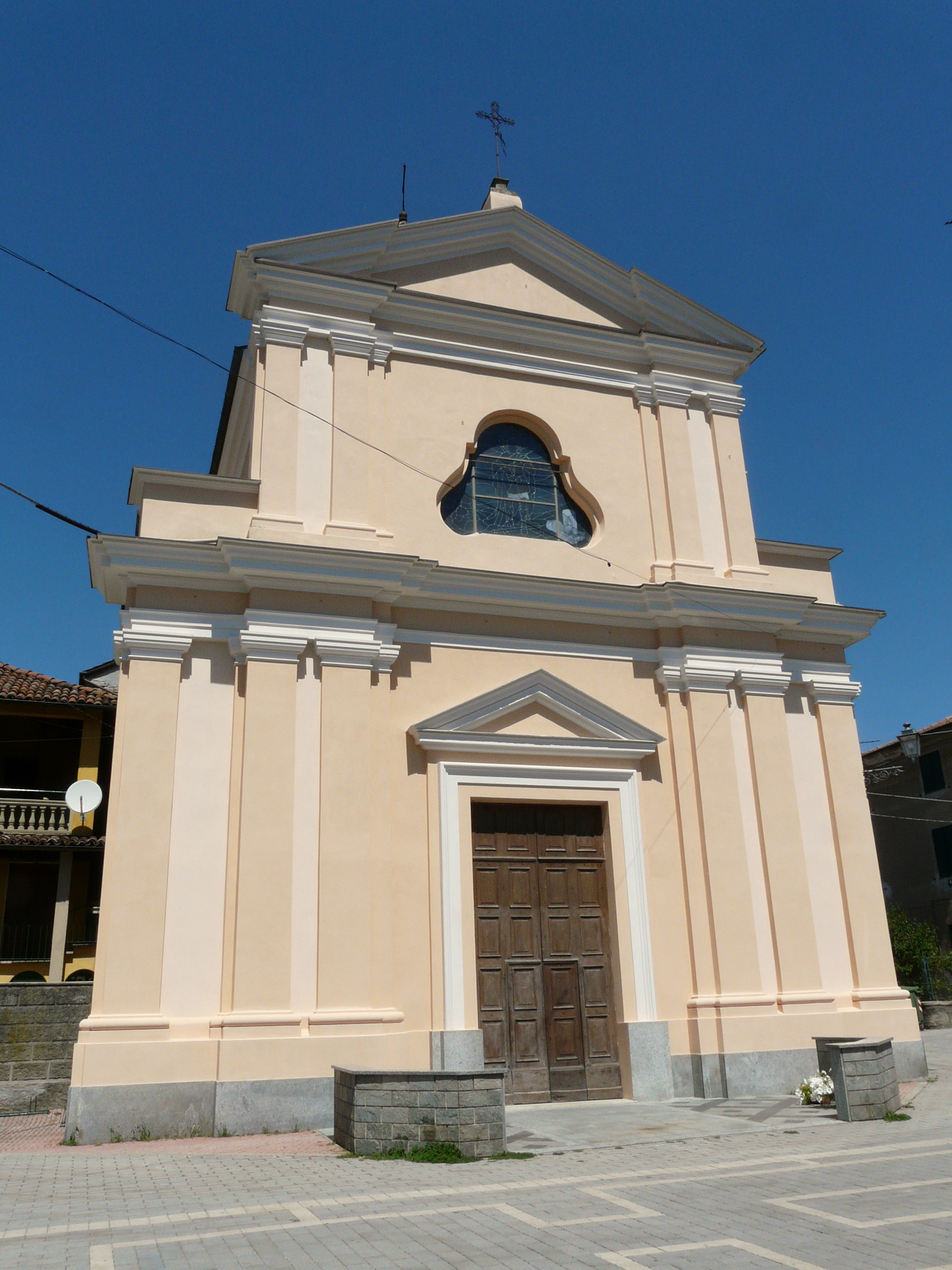 Chiesa di San Vittore, Borghetto di Borbera, Piemonte, Italia